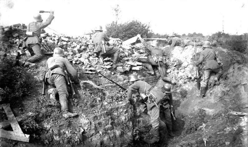 I. Weltkrieg 1914-1918 Abwehr eines englischen Angriffs in La Vacquarie Information added by Wikimedia users.